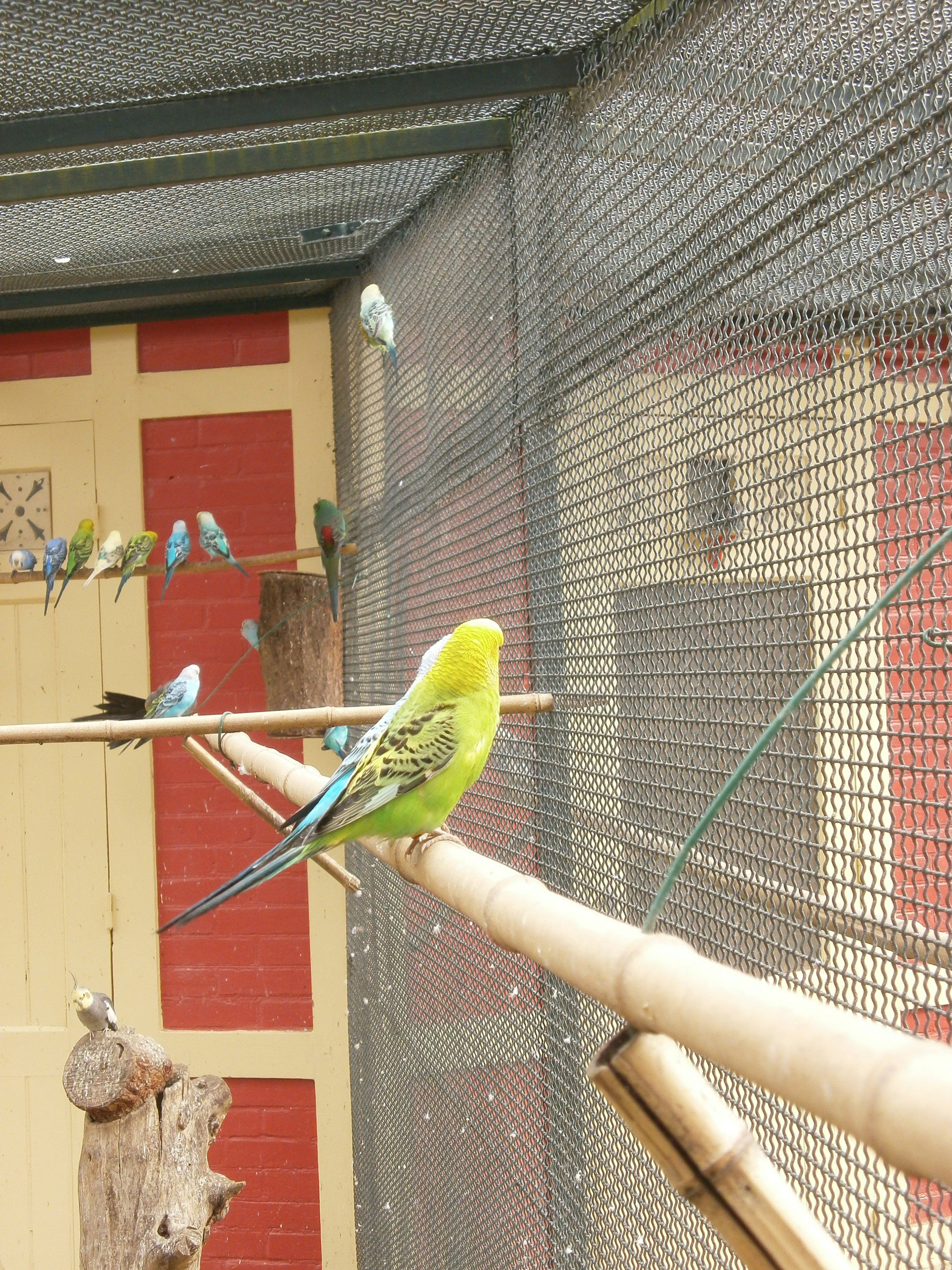 Rennes, Parc Thabor : Volières des perruches